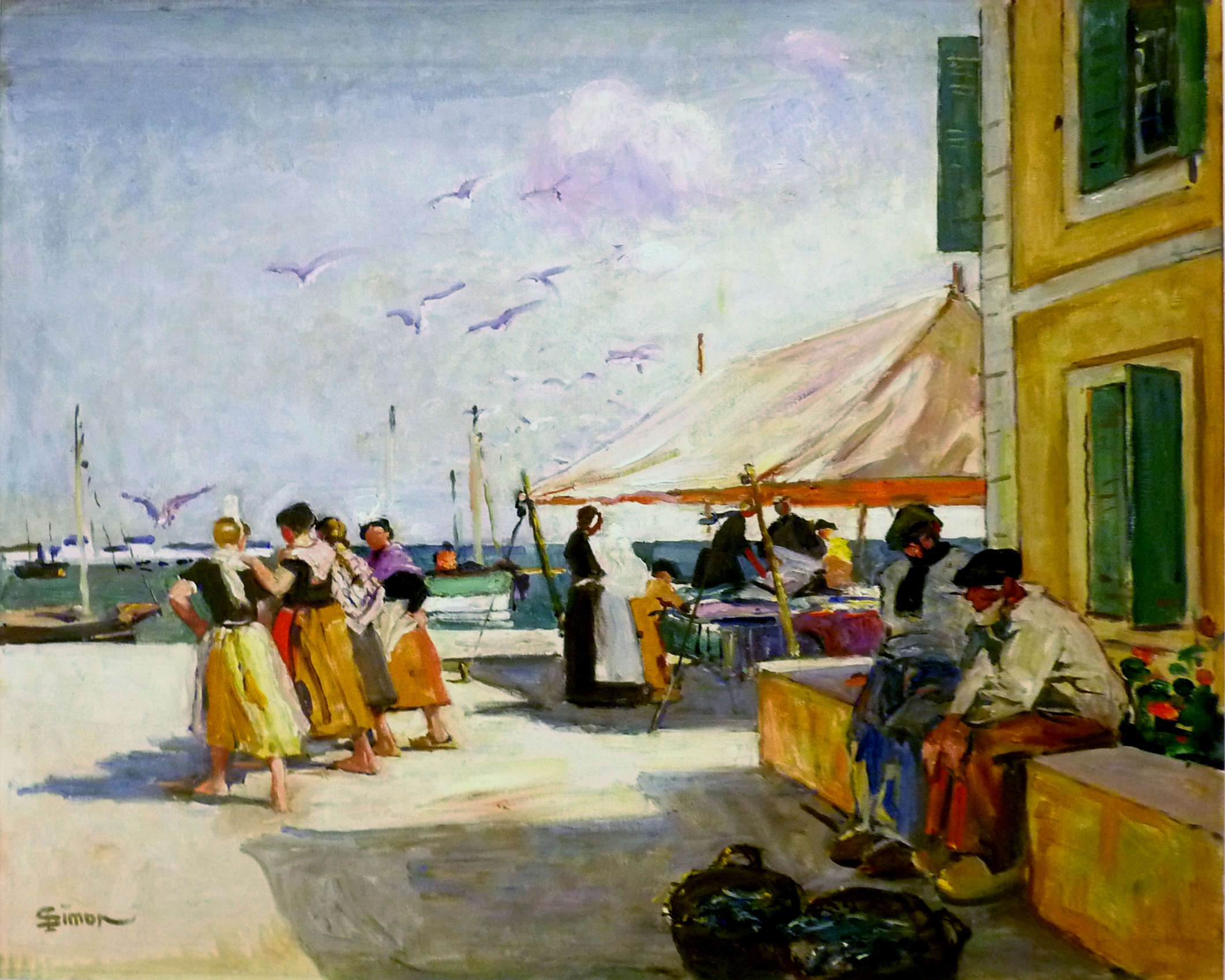 [à Penmarc'h]